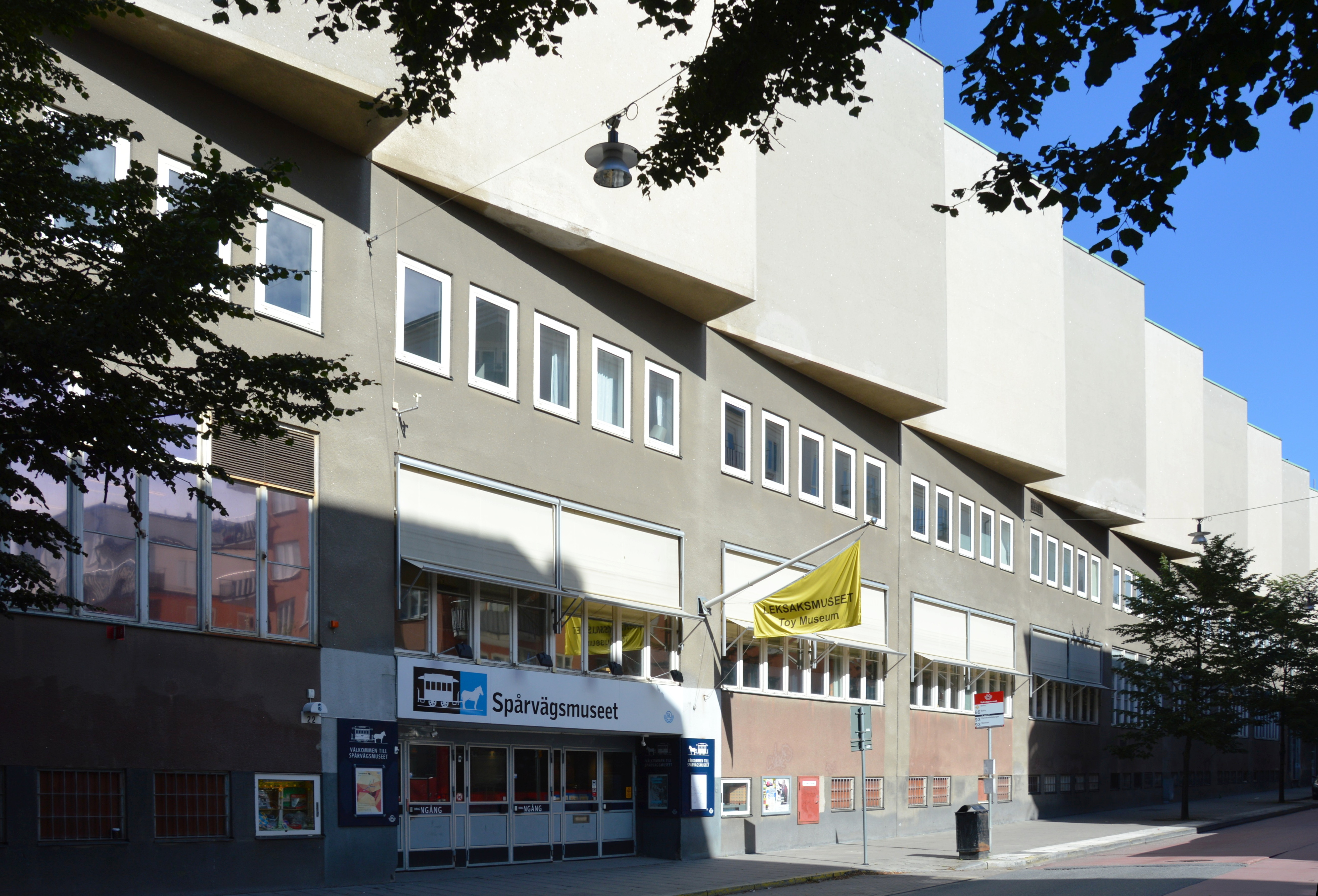 Straßenbahnmuseum Stockholm